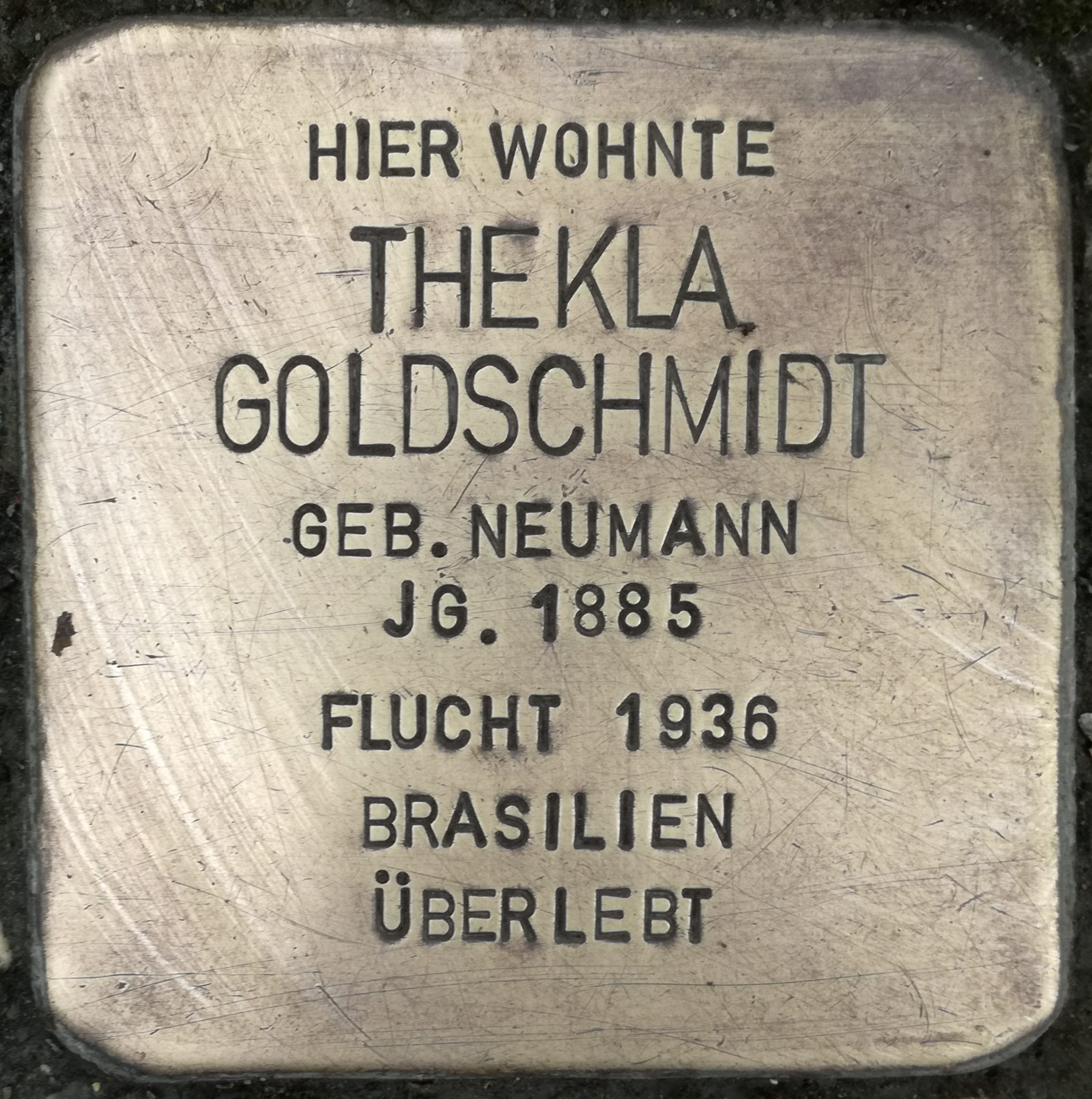 Hier wohnte Thekla Goldschmidt geborene Neumann Jahrgang 1885 Flucht 1936 Brasilien überlebt